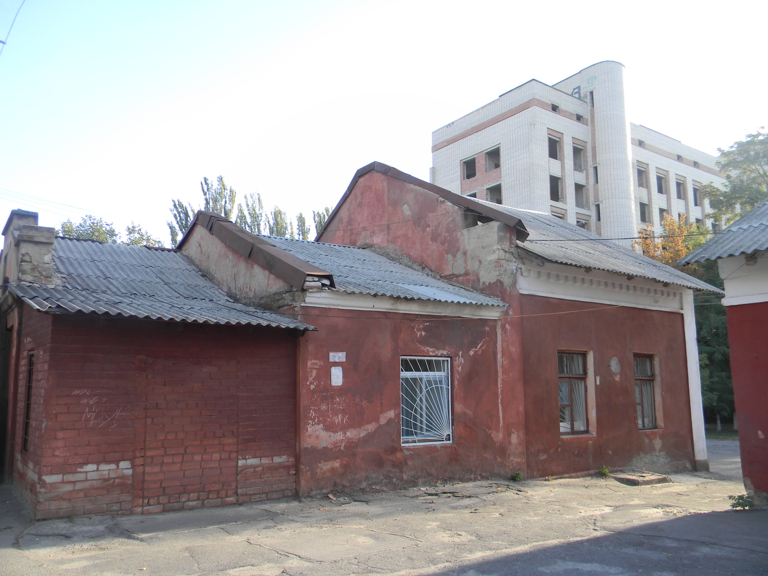 Корпус № 3 (колишня будівля моргу), Херсон, вул. Комарова, 2